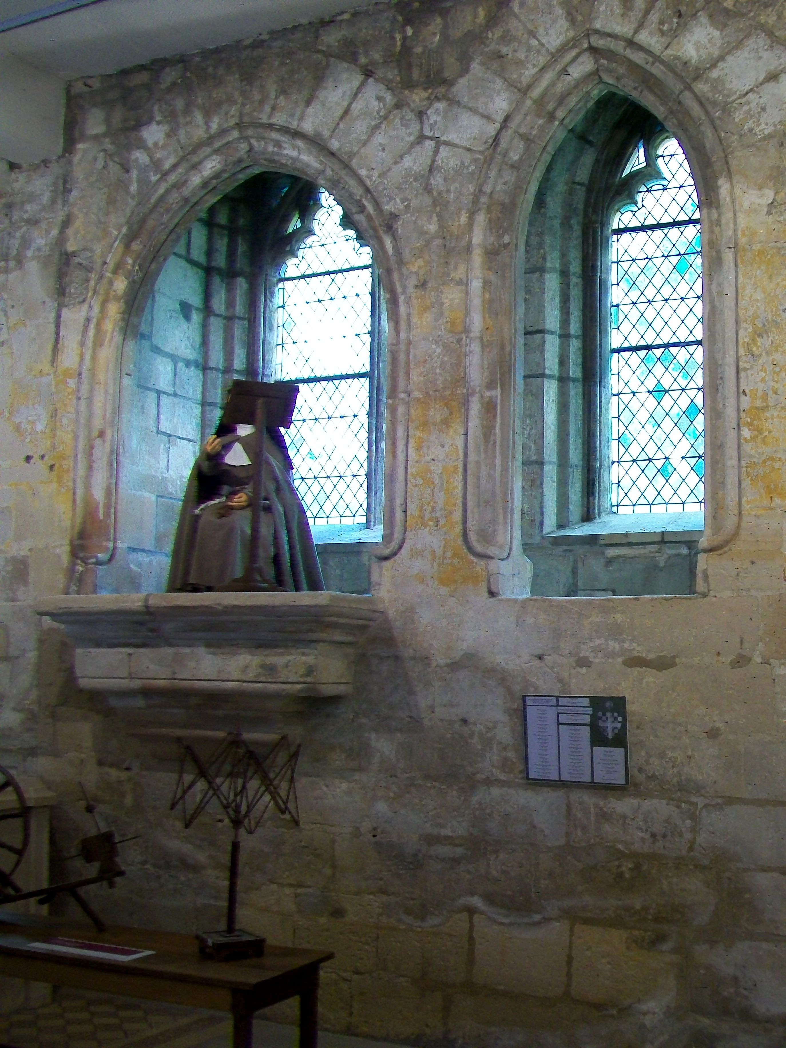 La chaire de la lectrice au réfectoire, construit dans l'épaisseur du mur (1,50 m) et ne faisant donc saillie ni à l'intérieur, ni à l'extérieur.